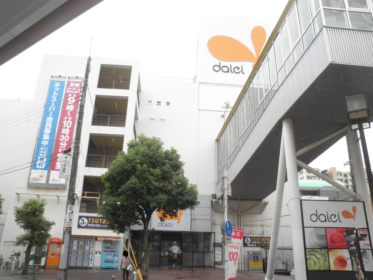 ダイエー池田駅前店